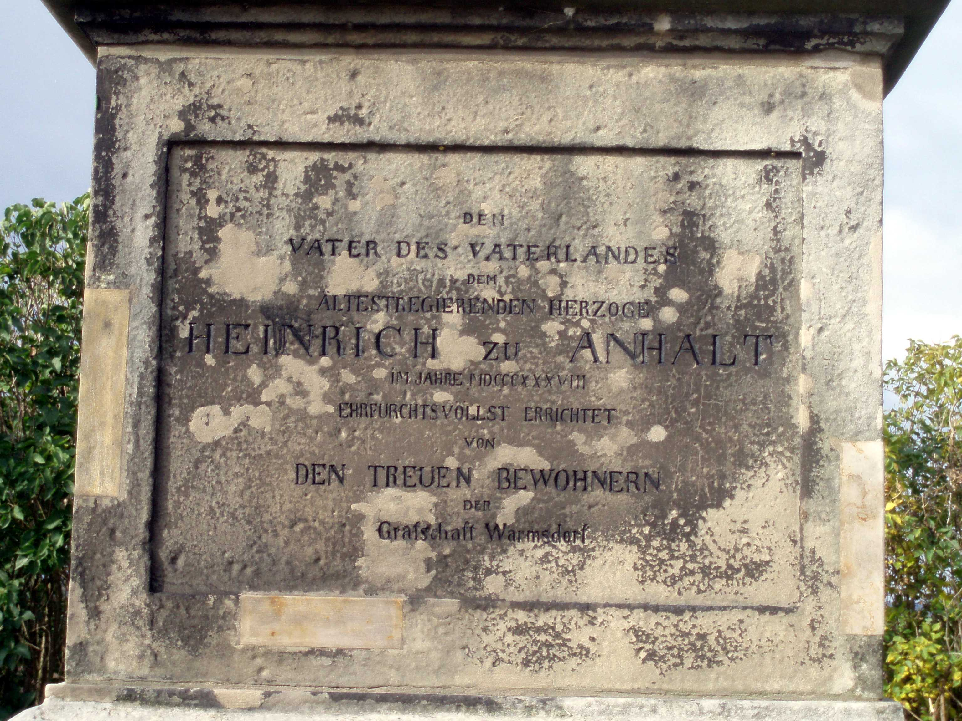 Inschrift auf der Straßenseite des Obelisks bei Giersleben